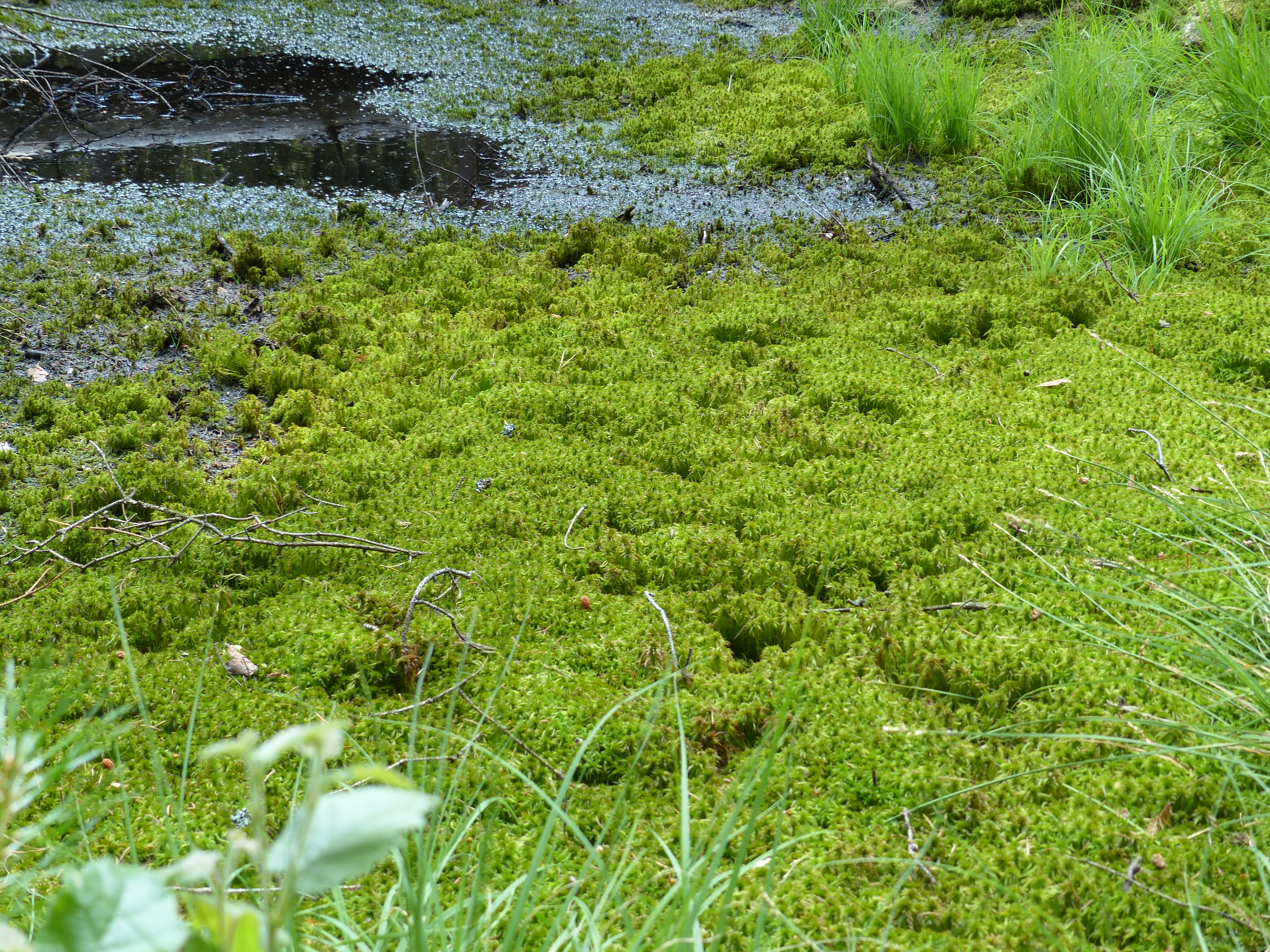 Ansicht im Hochmoor Torfmoorhölle bei Weißenstadt